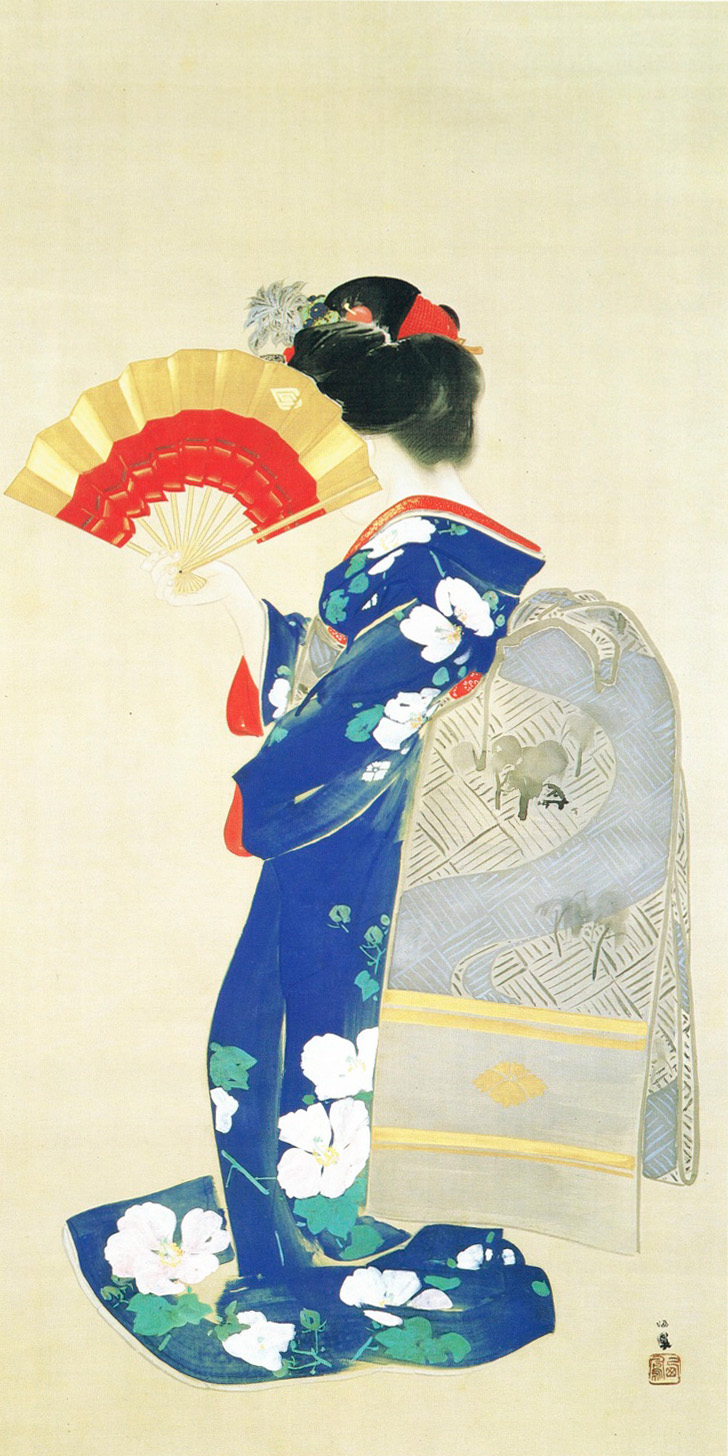 アレ夕立に 絹本着色 第3回文展出品作 高島屋史料館